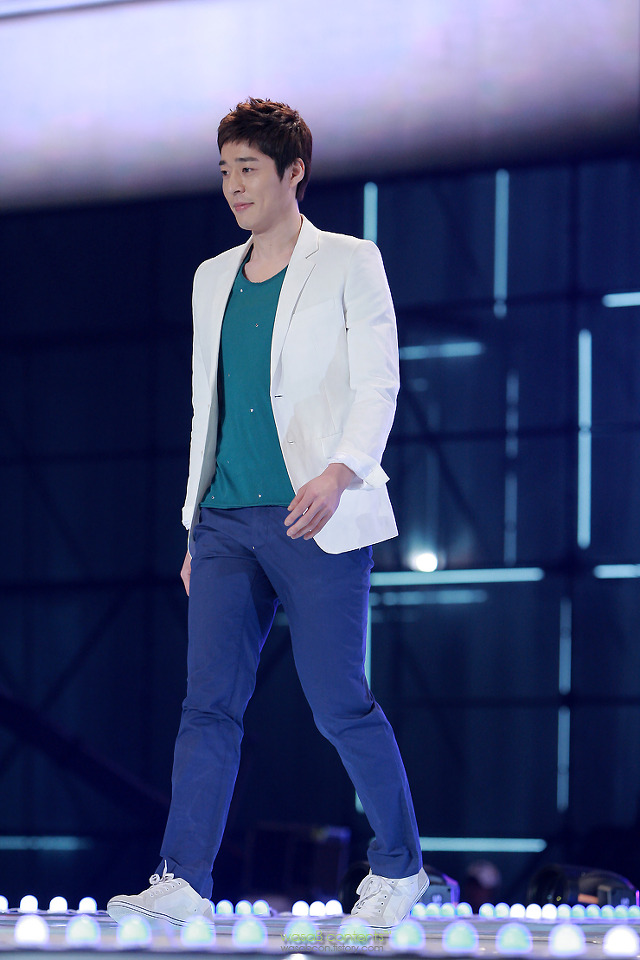 배우 서지석